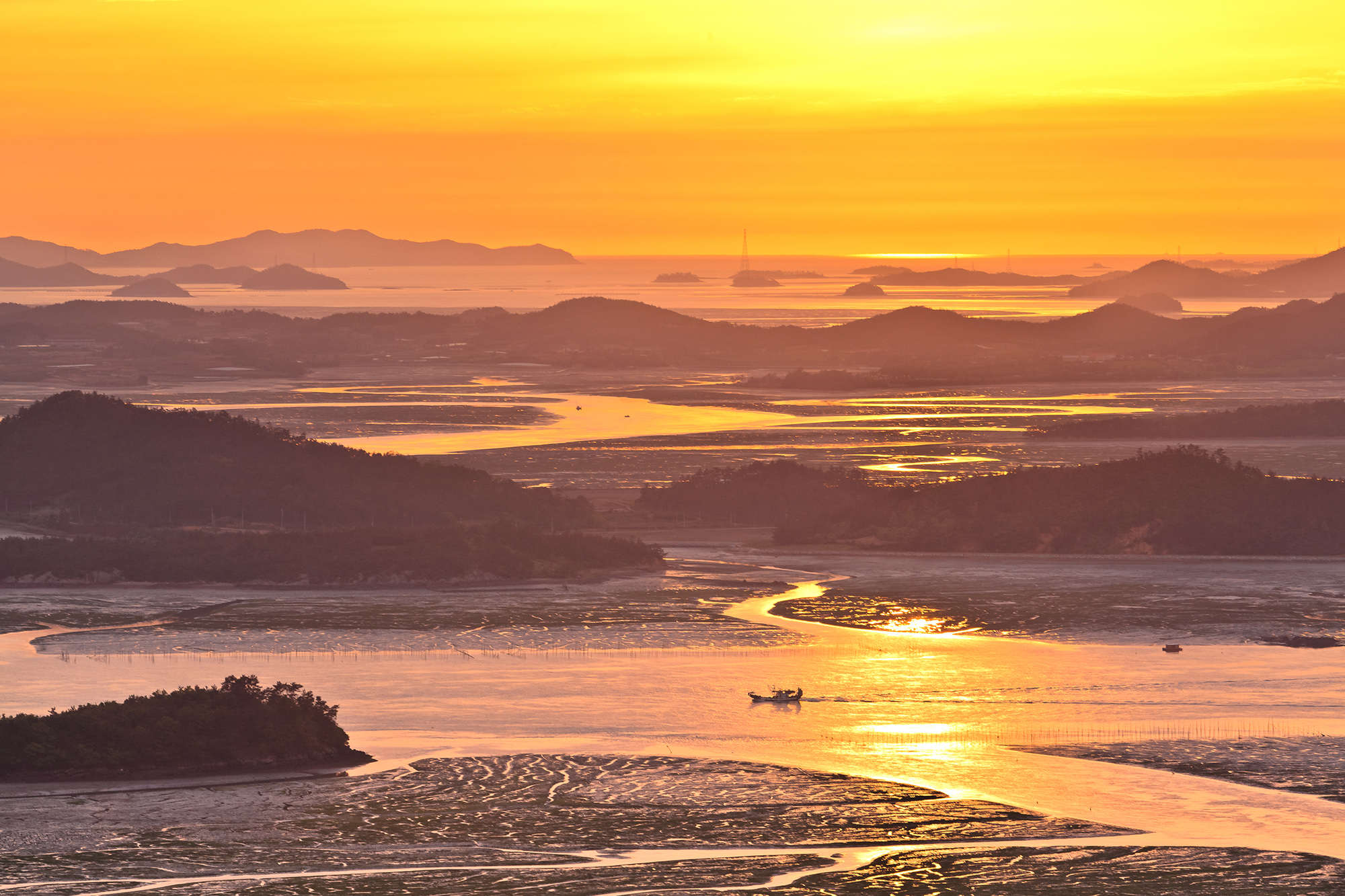 아름다운 다도해 국립해상